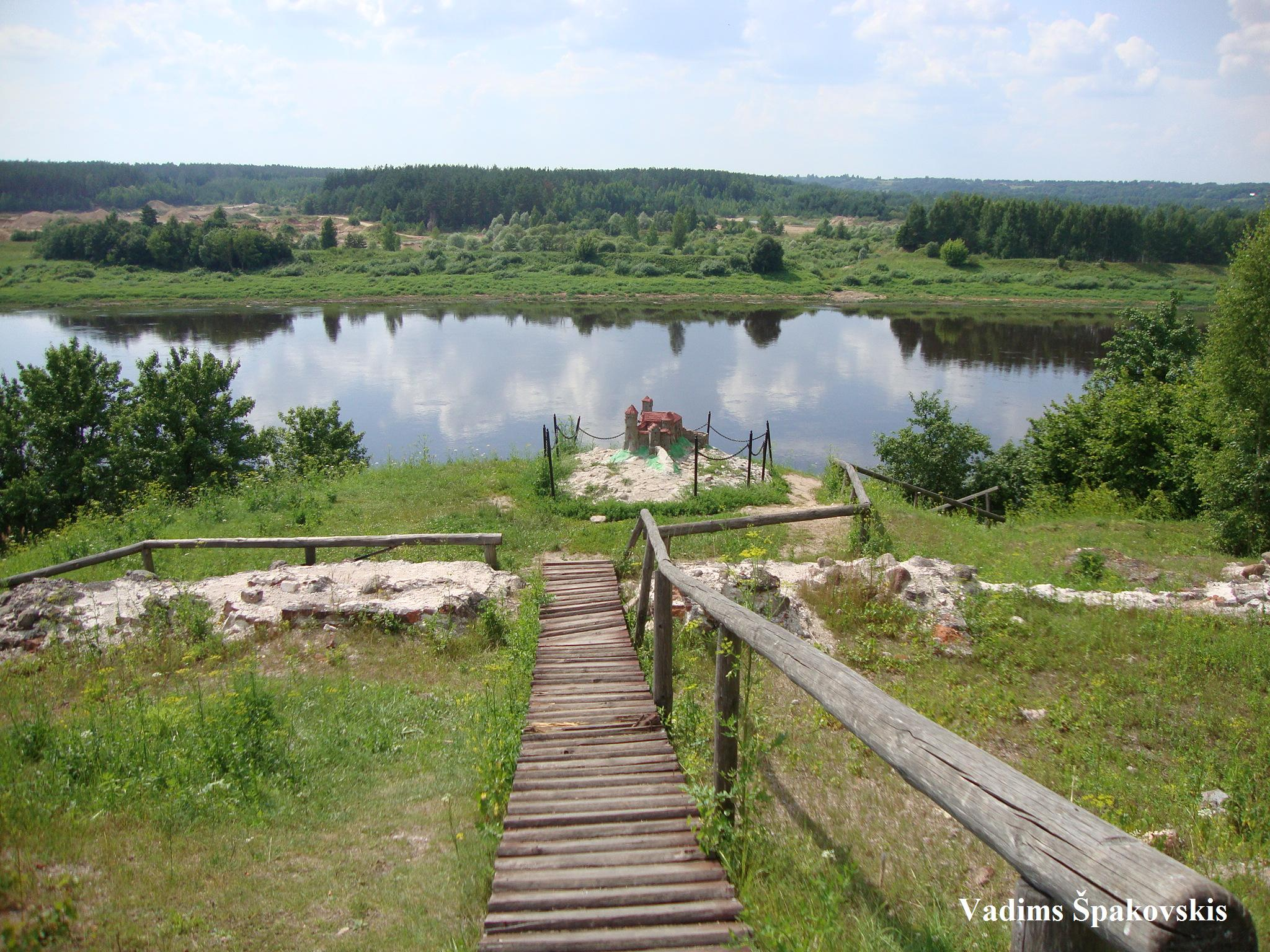 Динабургский замок. Макет на месте старого замка, фундаменты стен замка, вид на Двину и заречье. Автор фото: Вадим Шпаковский